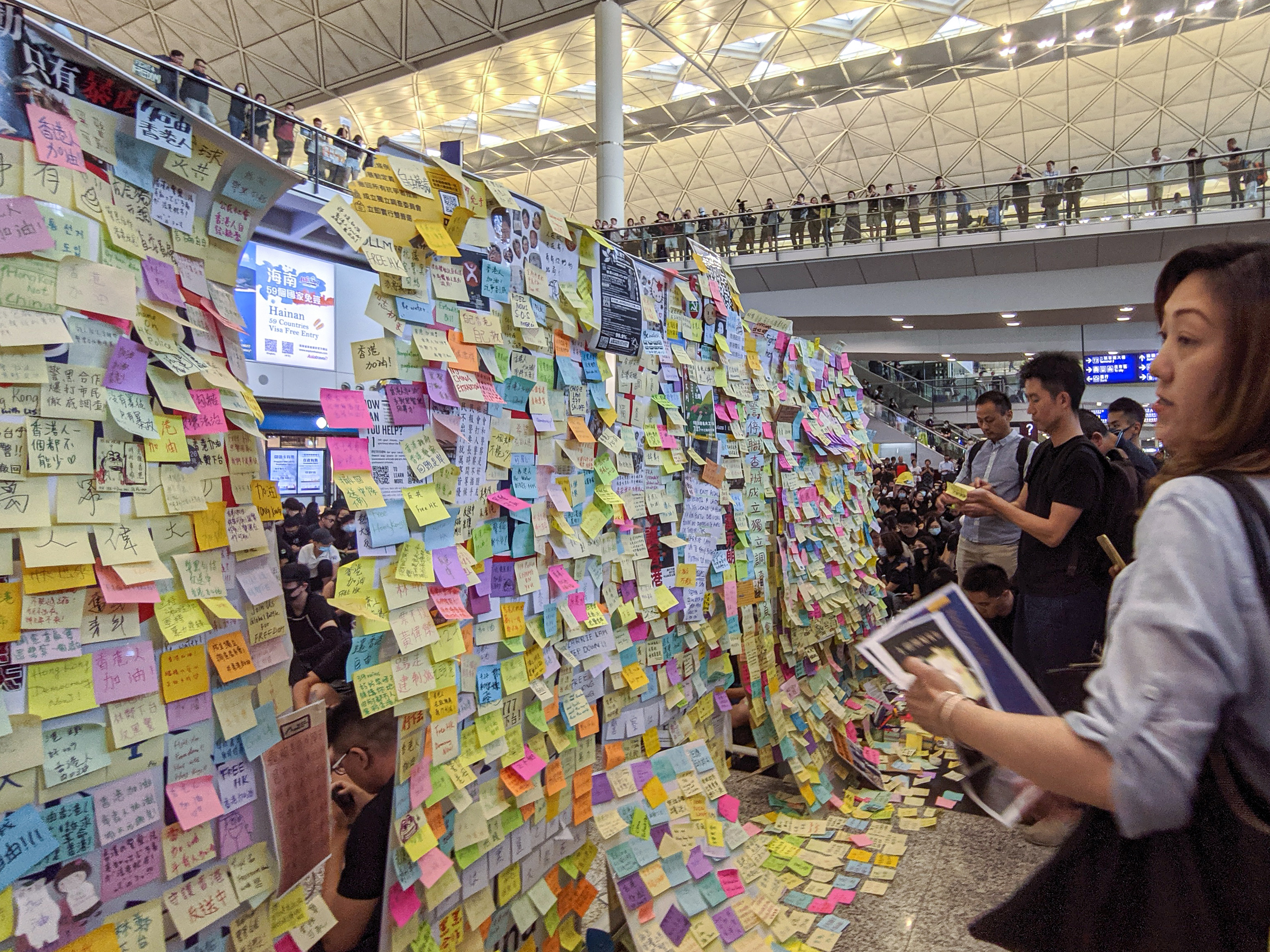 IMG_20190726_183048